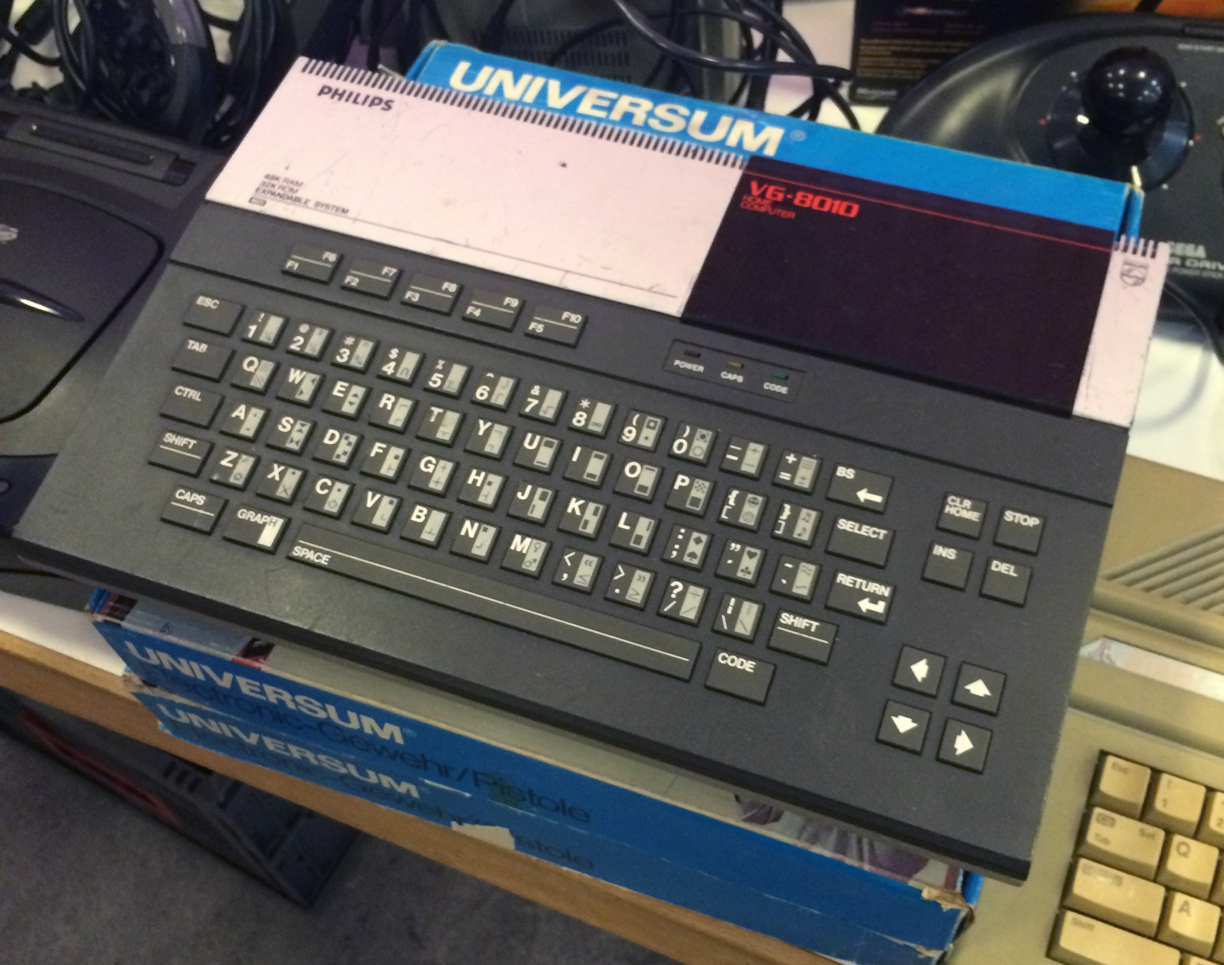 Philips VG-8010